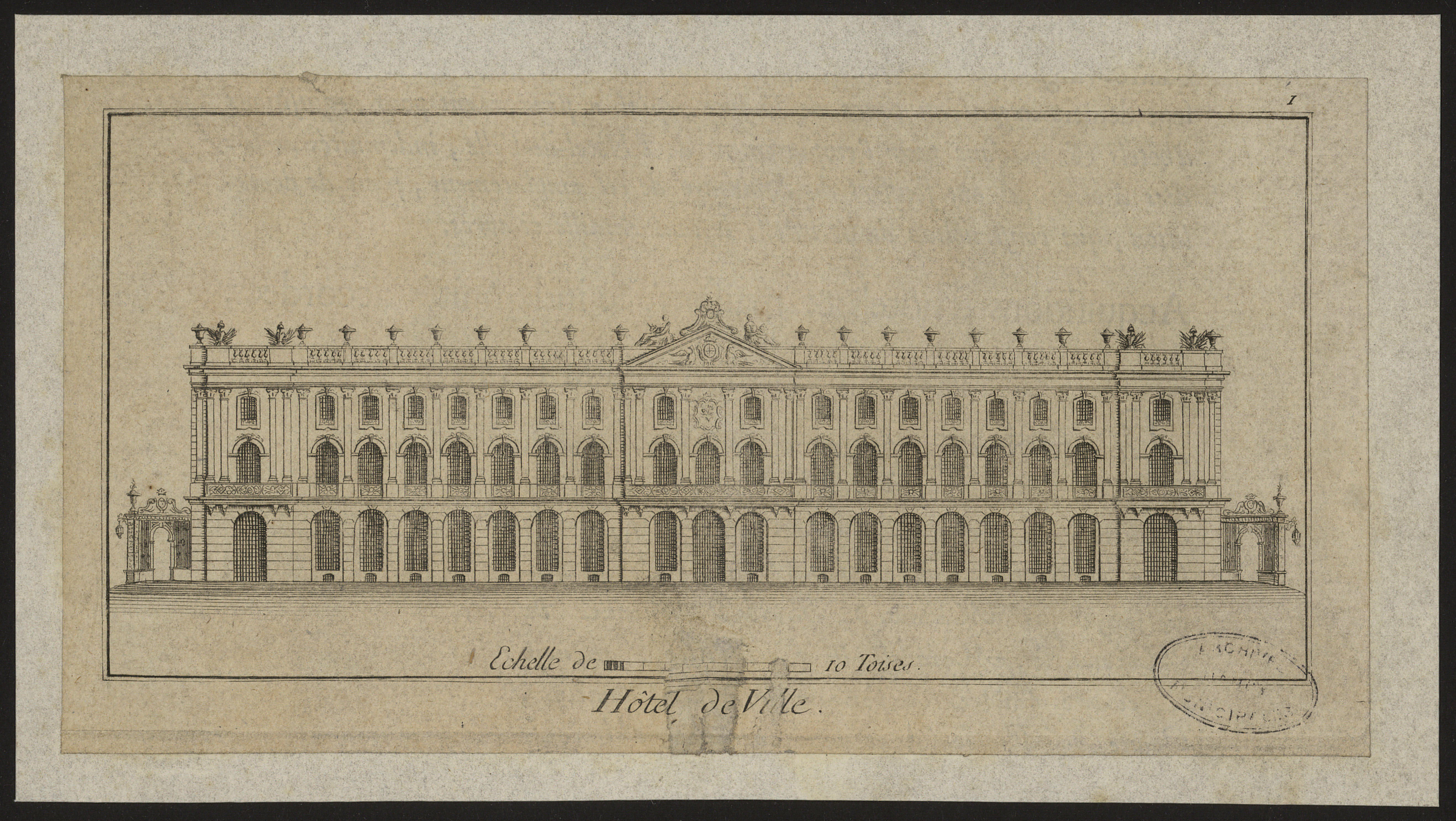 Projet de façade pour l'Hotel de Ville de la Place Stanislas de Nancy présenté par Emmanuel Héré